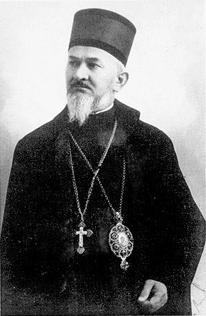 Епископ Савва (Трлаич)